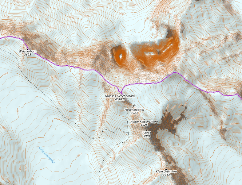 carte réalisée sur umap This map may be incomplete, and may contain errors. Don't rely solely on it for navigation.